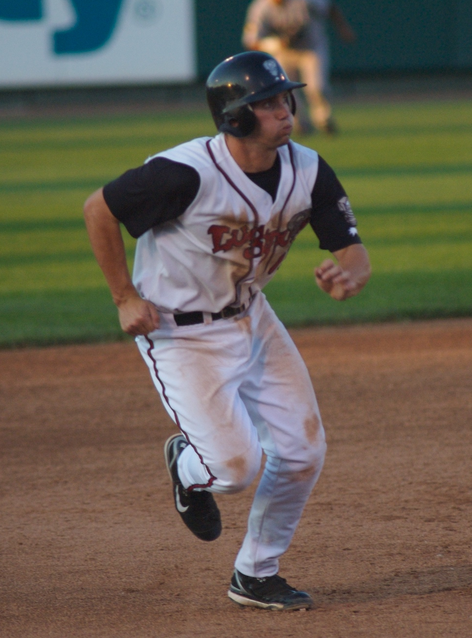 Scott Campbell